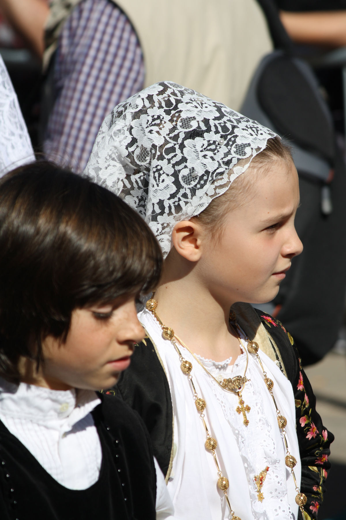 sardinian people sardinians sardi folk sardinia island sardegna sardinia sardaigne cerdeña sardinien abiti tradizionali costumi gente persone cavalcata sarda